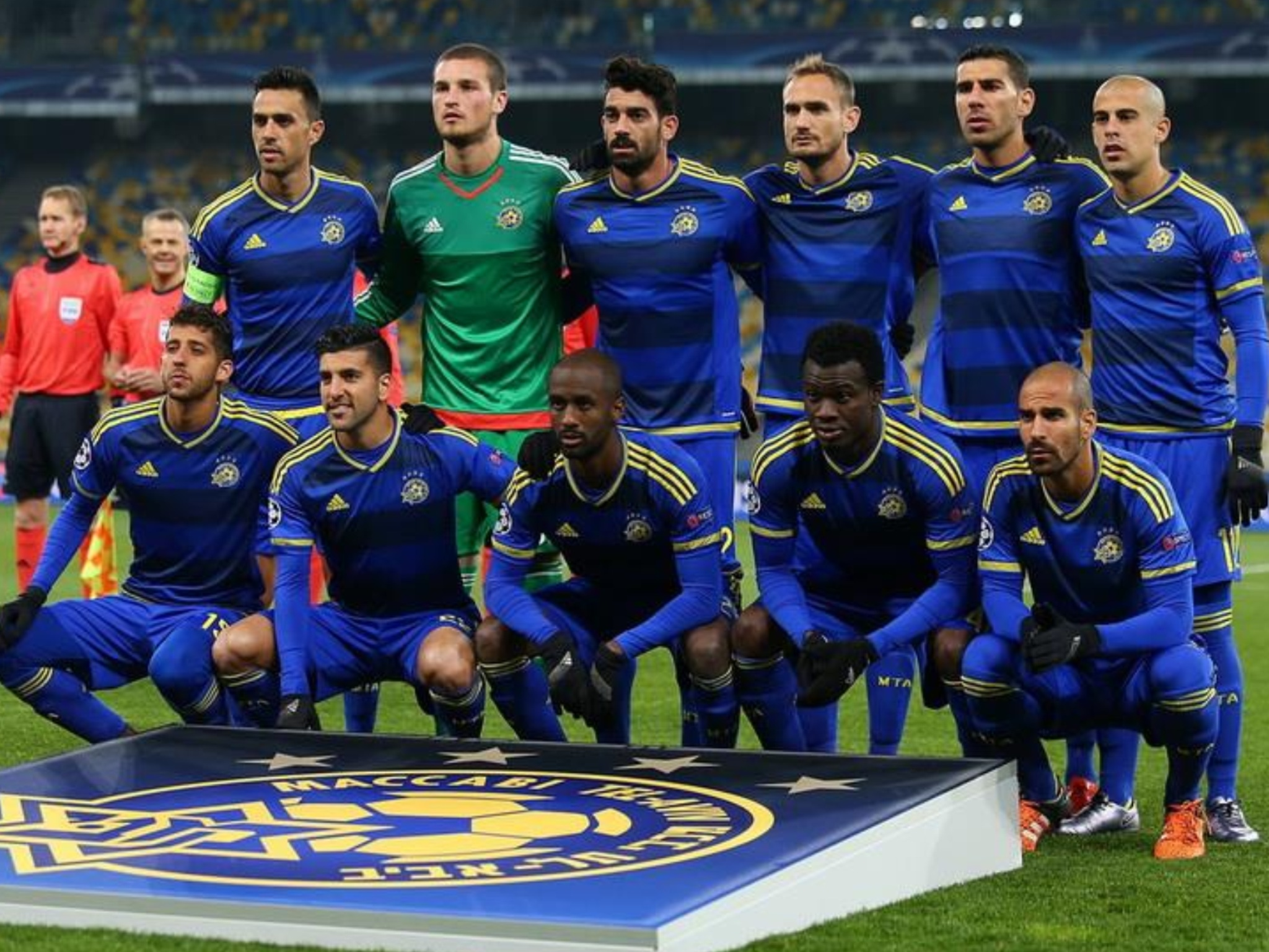 Maccabi Tel-Aviv against Dynamo Kiev